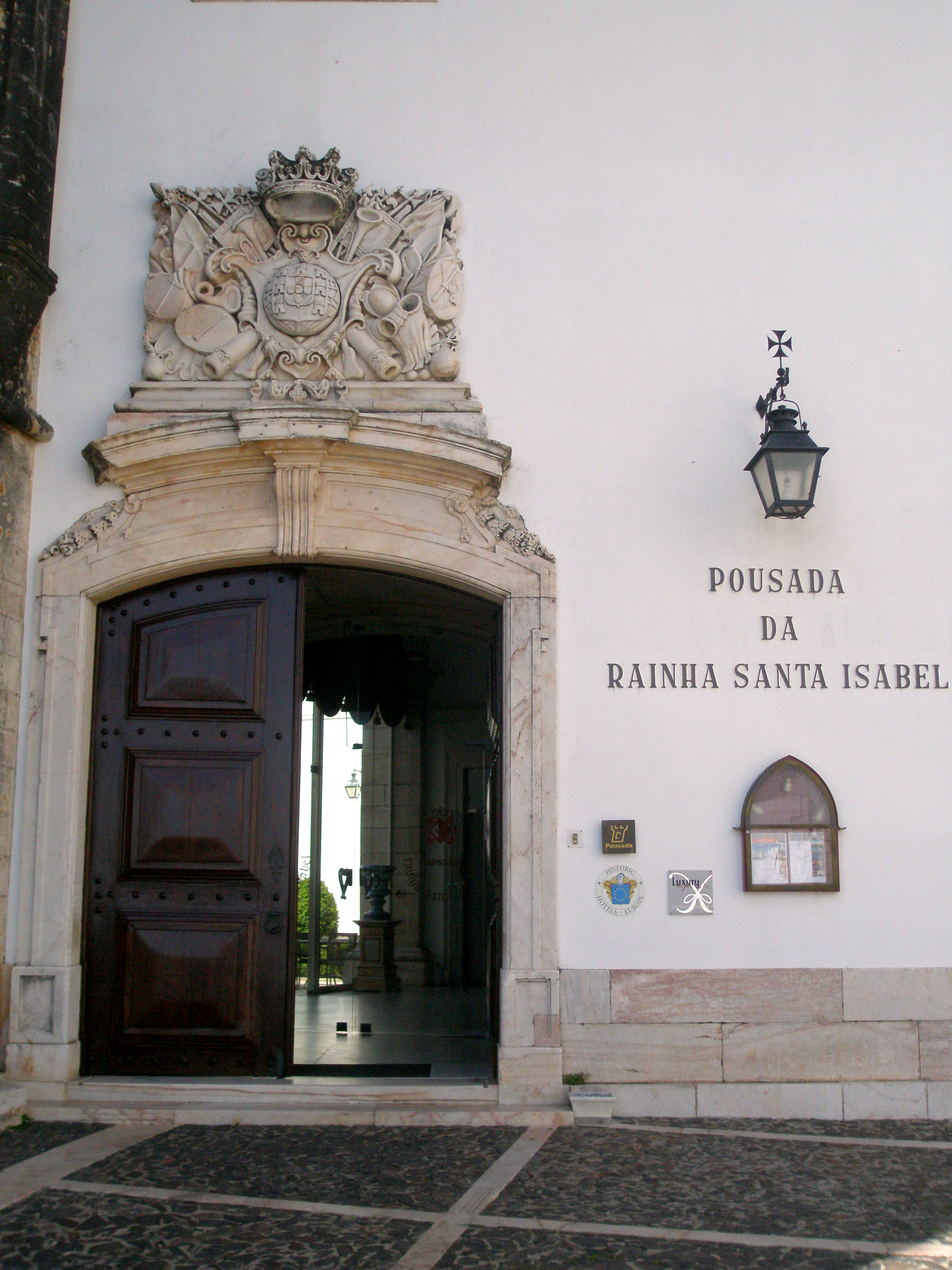 Entrance to Estremoz Pousada